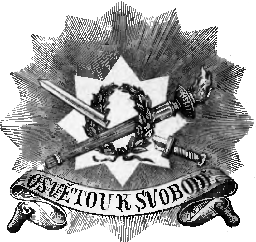 Osvětou k svobodě z knihy Švýcarsko, jeho ústava, jeho vláda, jeho samospráva.